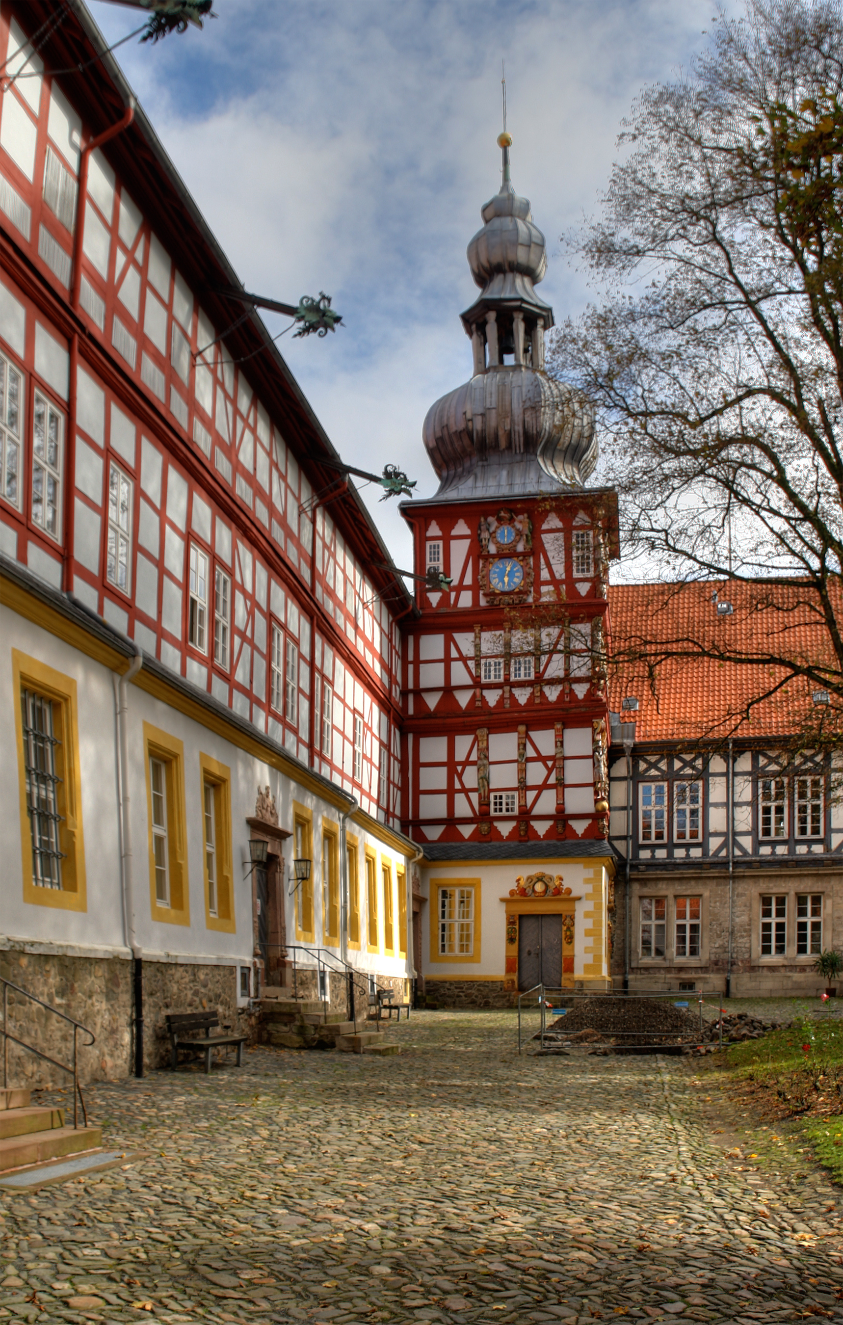 Schloss Herzberg, Herzberg am Harz, Schlossinnenhof mit Turm